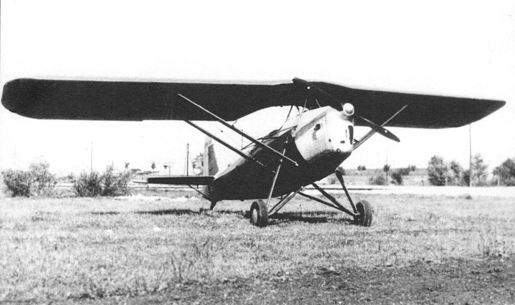 RWD-17 a Walter Major 4, prototyp